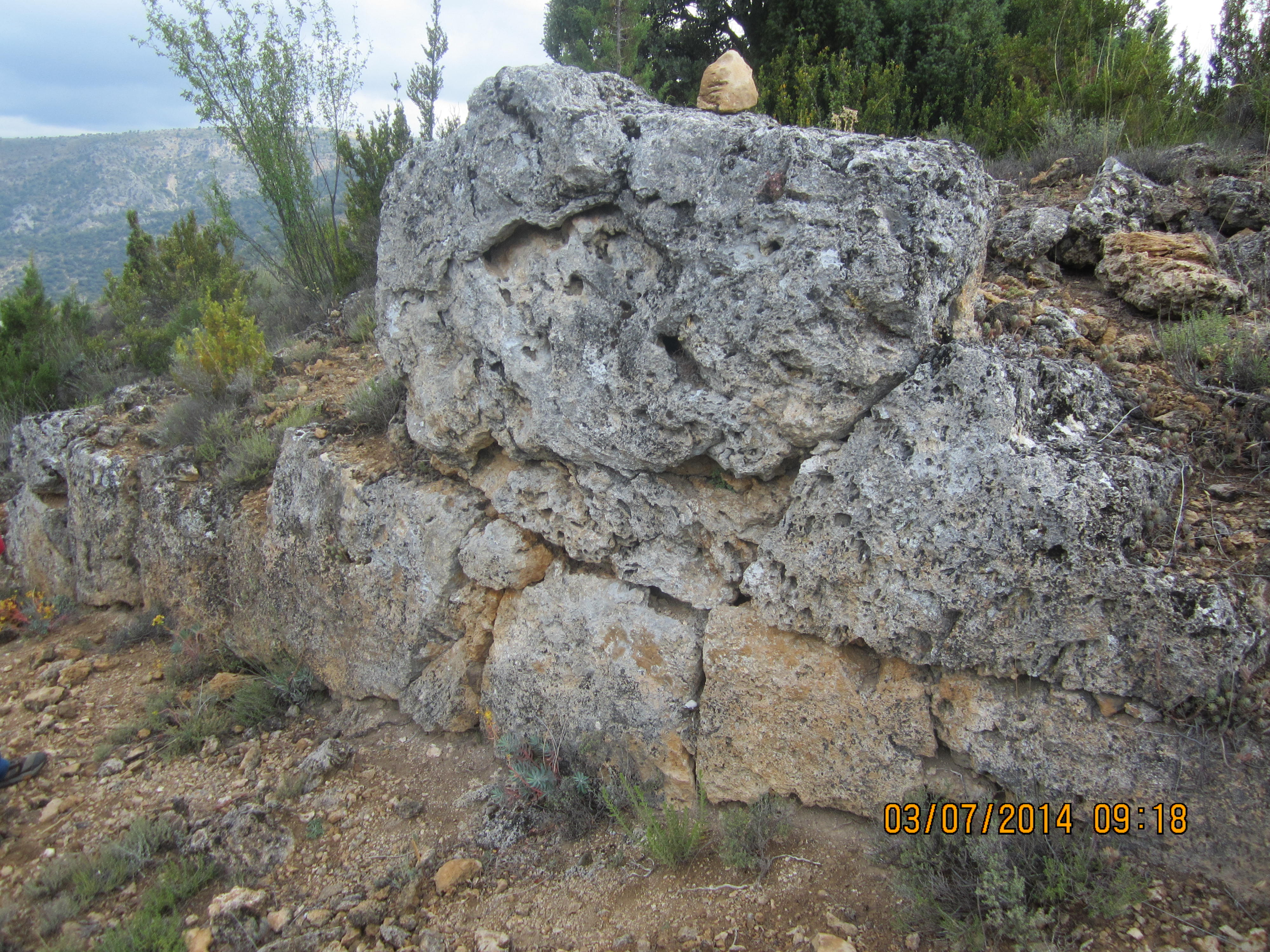 Grandes rocas que presentan la base que tuvo El Castillo de Huertapelayo